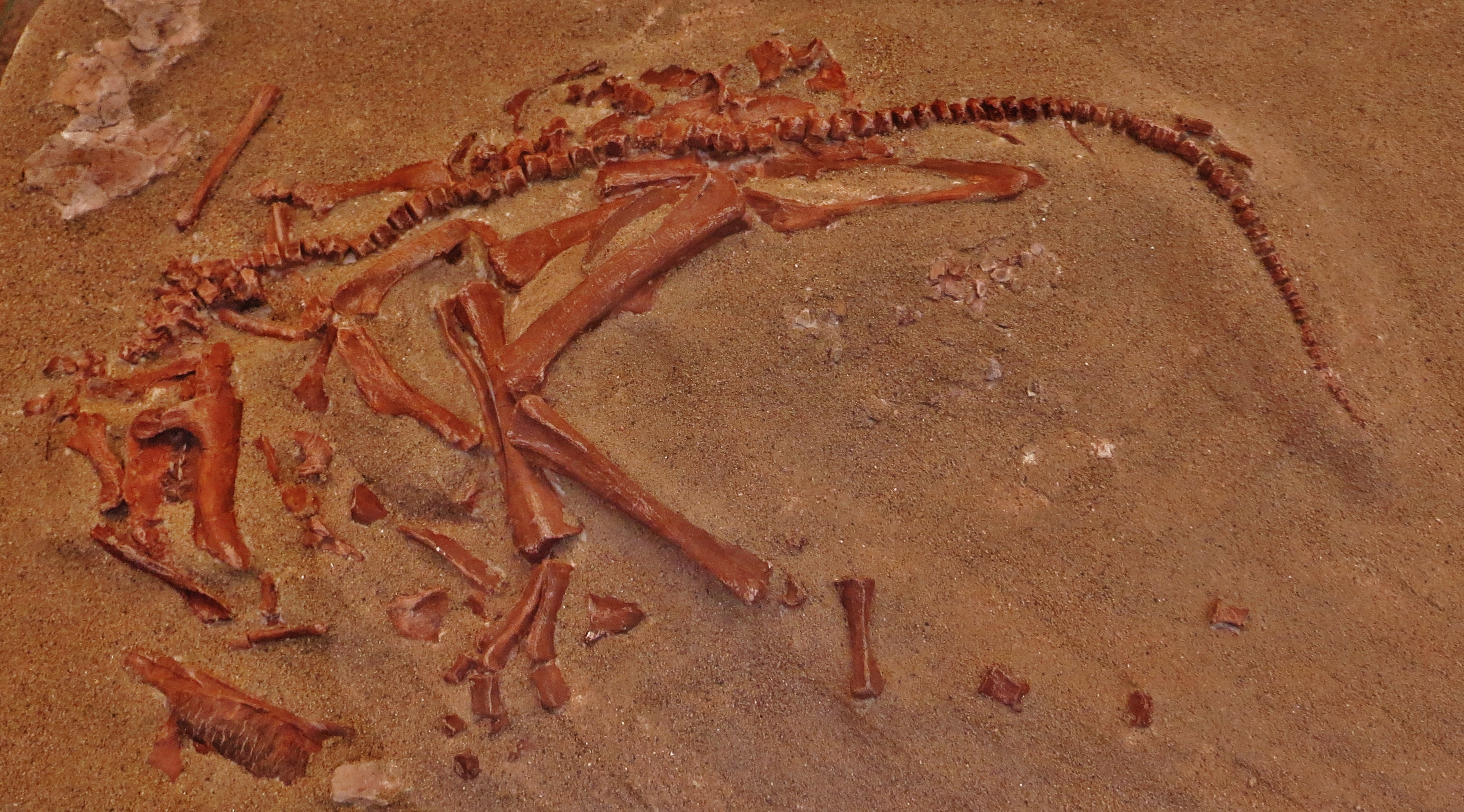 Baby Hypacrosaurus - ornithopod dinosaur